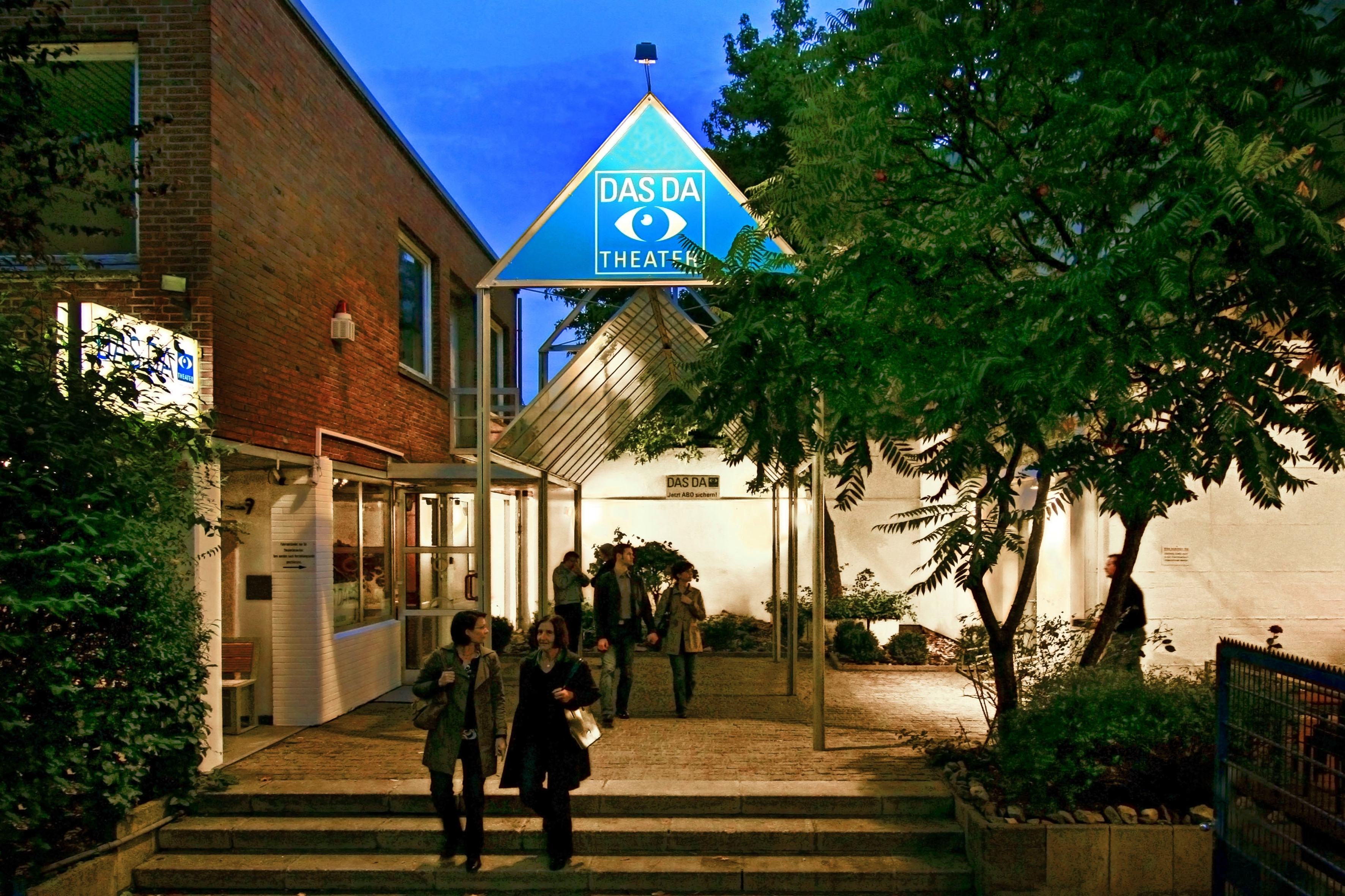 Eingangsbereich Liebigstraße 9